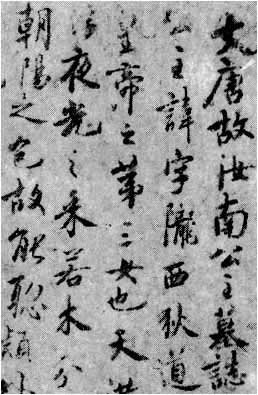 虞世南《汝南公主墓志》，初唐书法。原作为二维平面艺术（古代书法），作者逝世已逾百年，无特殊版权要求。